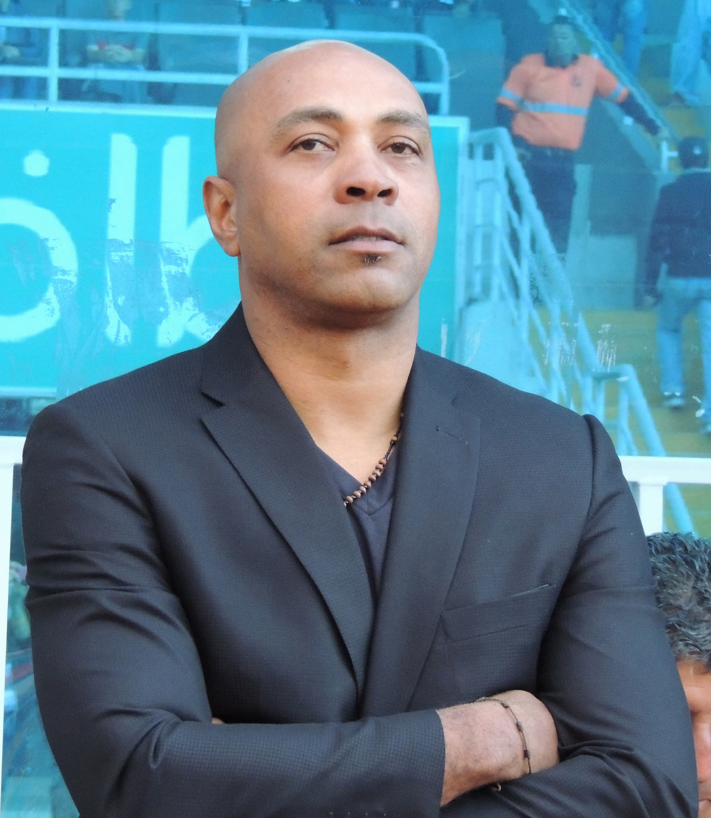 Esta obra de Luis Manuel Madrigal está bajo una licencia de Creative Commons Reconocimiento-CompartirIgual 4.0 Internacional. Para una versión sin logo escriba a